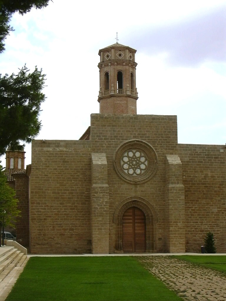 Rueda - Iglesia